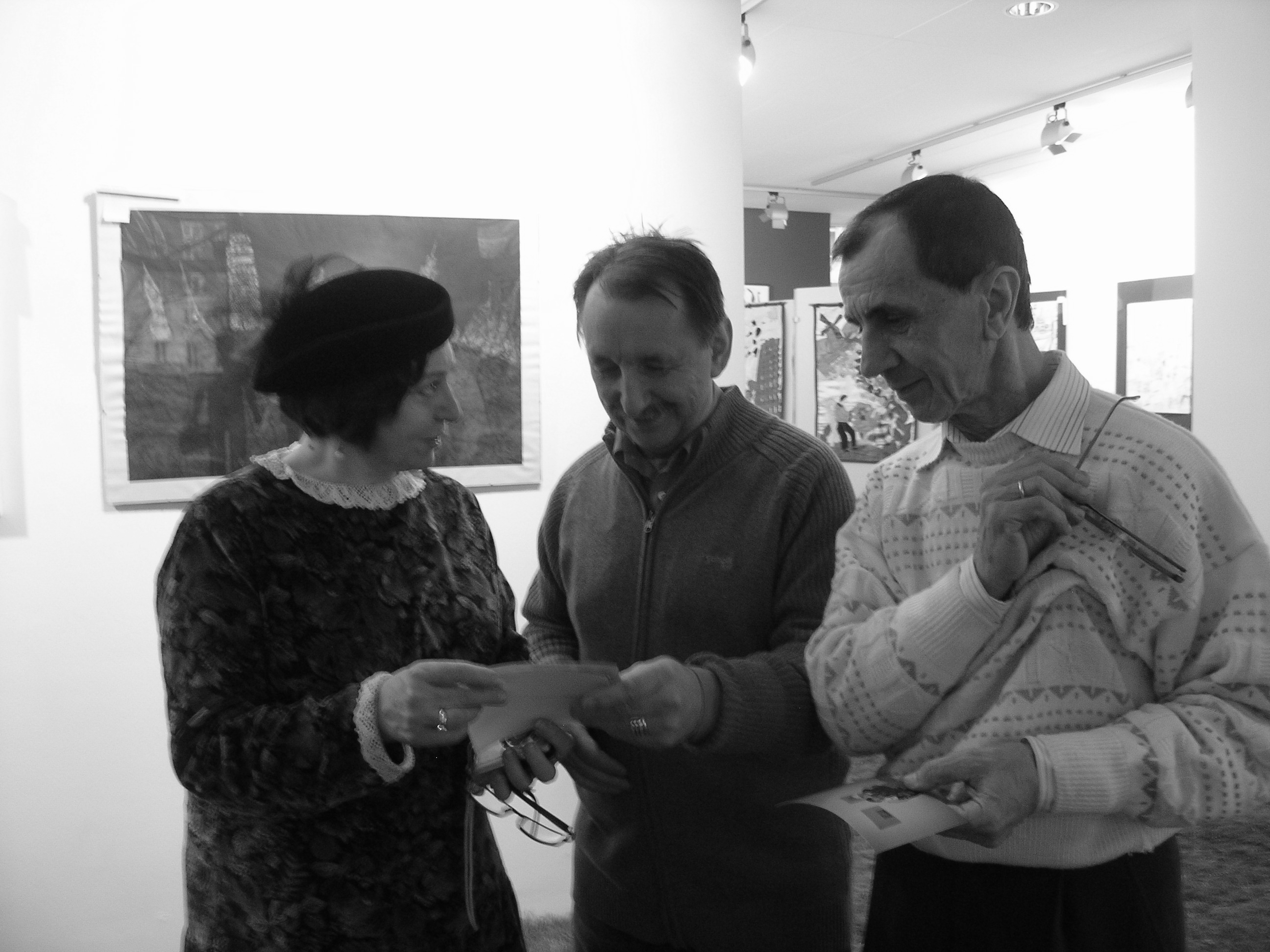 Kompozytor - January Zaradny (z prawej) i autor książki „Marta Mirska. Gloria i gehenna” Tadeusz Stolarski (w środku) podczas uroczystości związanych z odsłonięciem tablicy na Domu Marty Mirskiej w Alei Wyzwolenia 9 w Warszawie w 20 rocznicę śmierci Artystki – 15 listopada 2011 r.